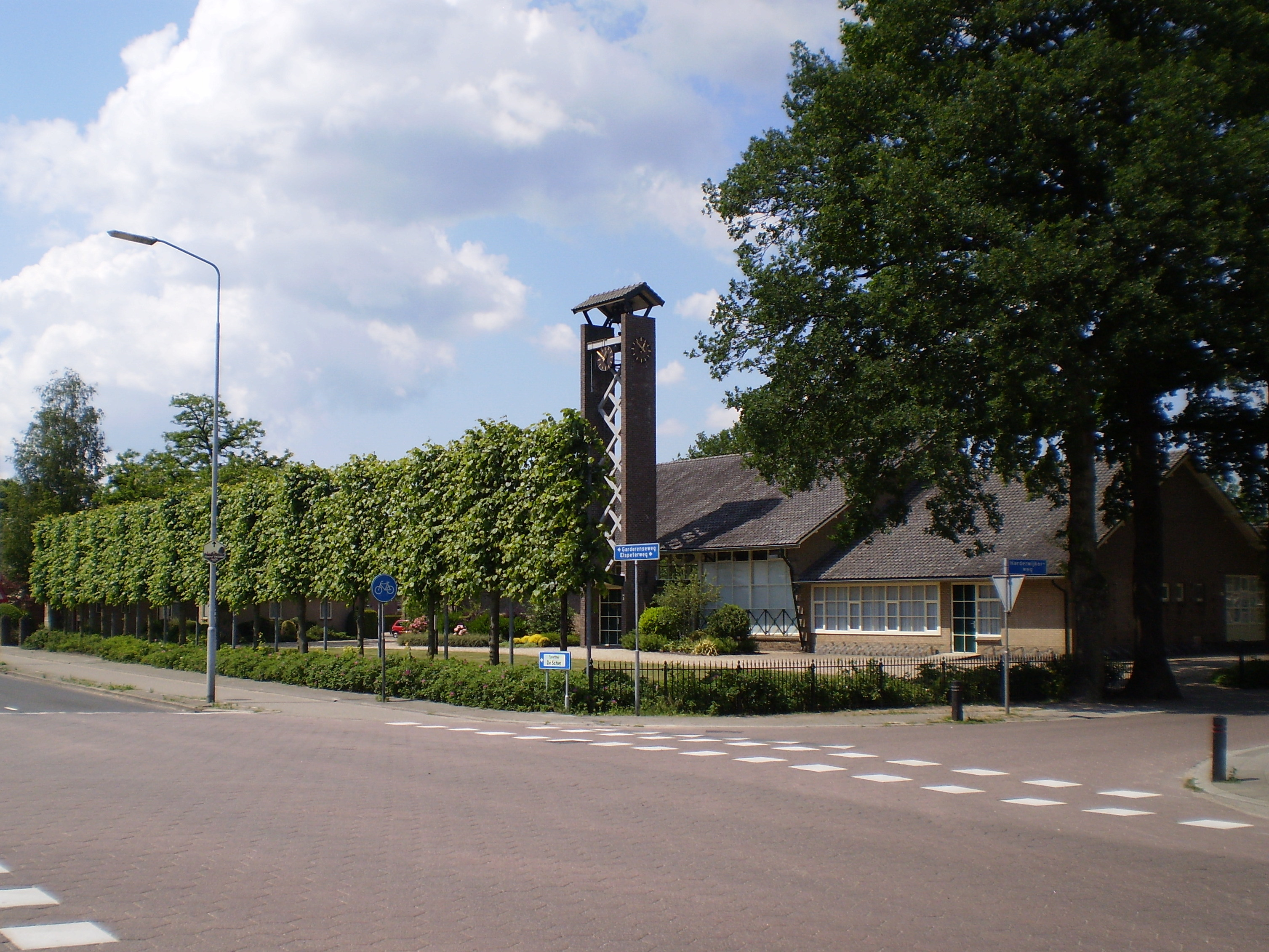 Hervormde kerk, Uddel